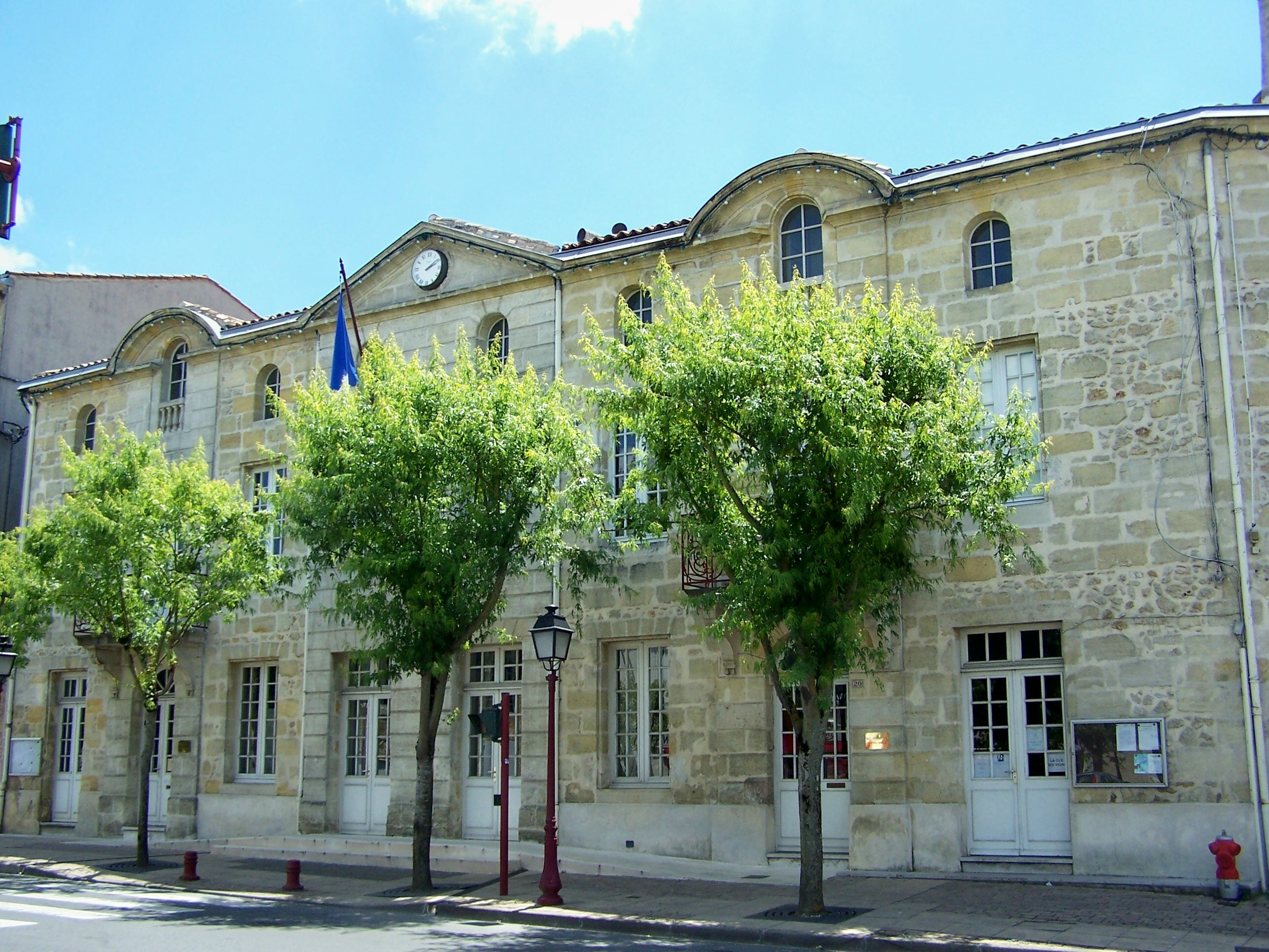 Mairie de Castres-Gironde, Gironde, France